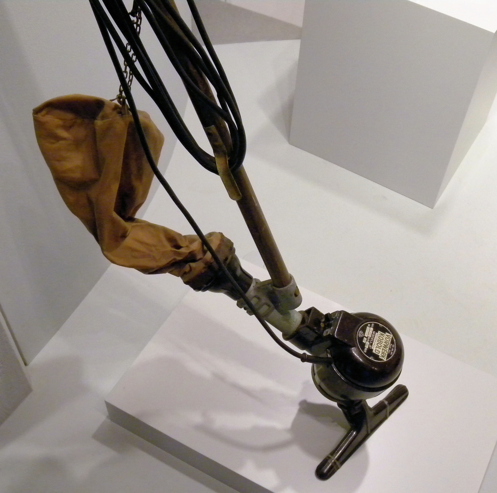 Staubsauger der Firma Vorwerk Typ Kobold aus den 1950er Jahren